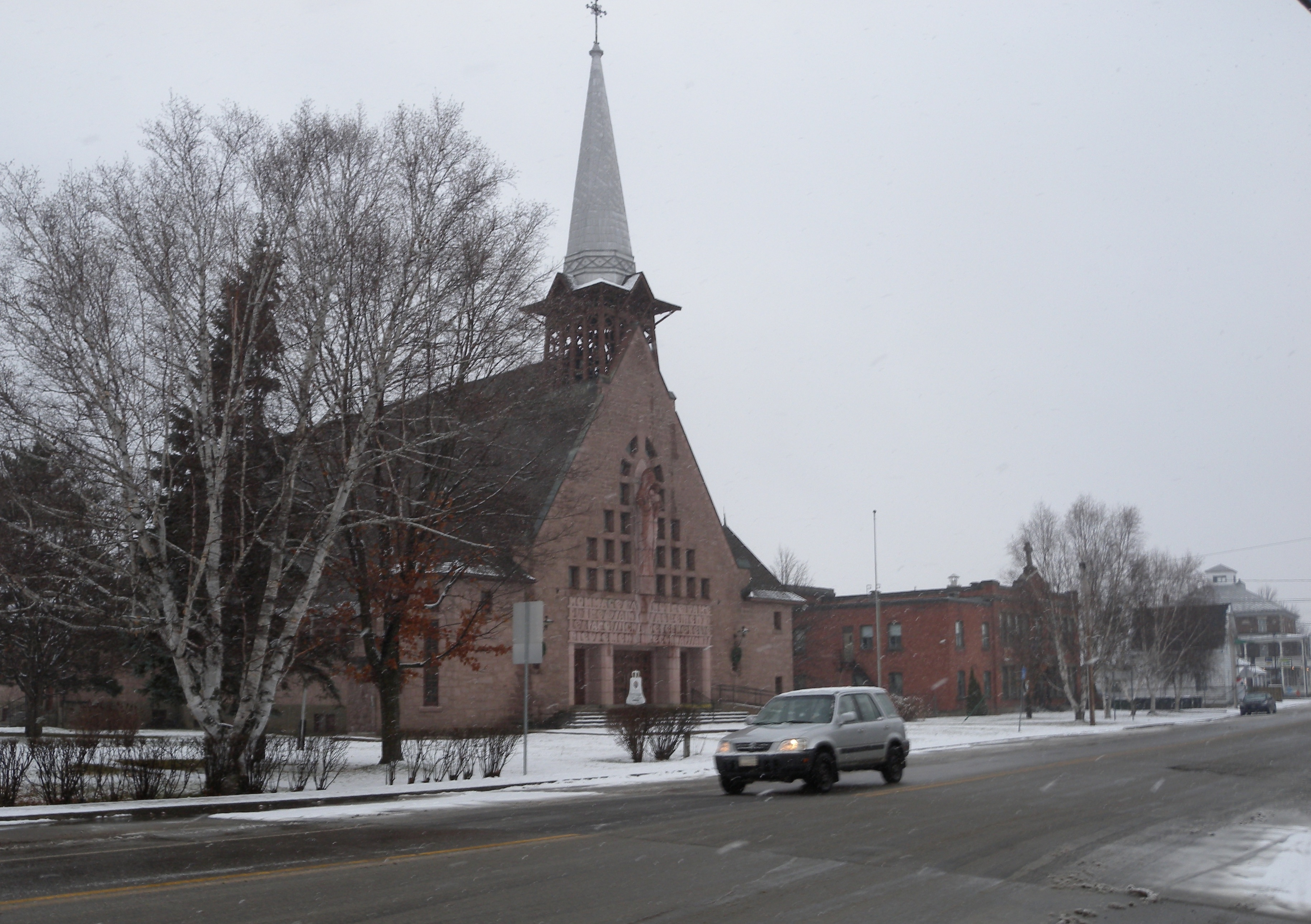 L'église Notre-Dame-du-Très-Saint-Sacrement à Ferme-Neuve, cité immeuble patrimonial en 2013